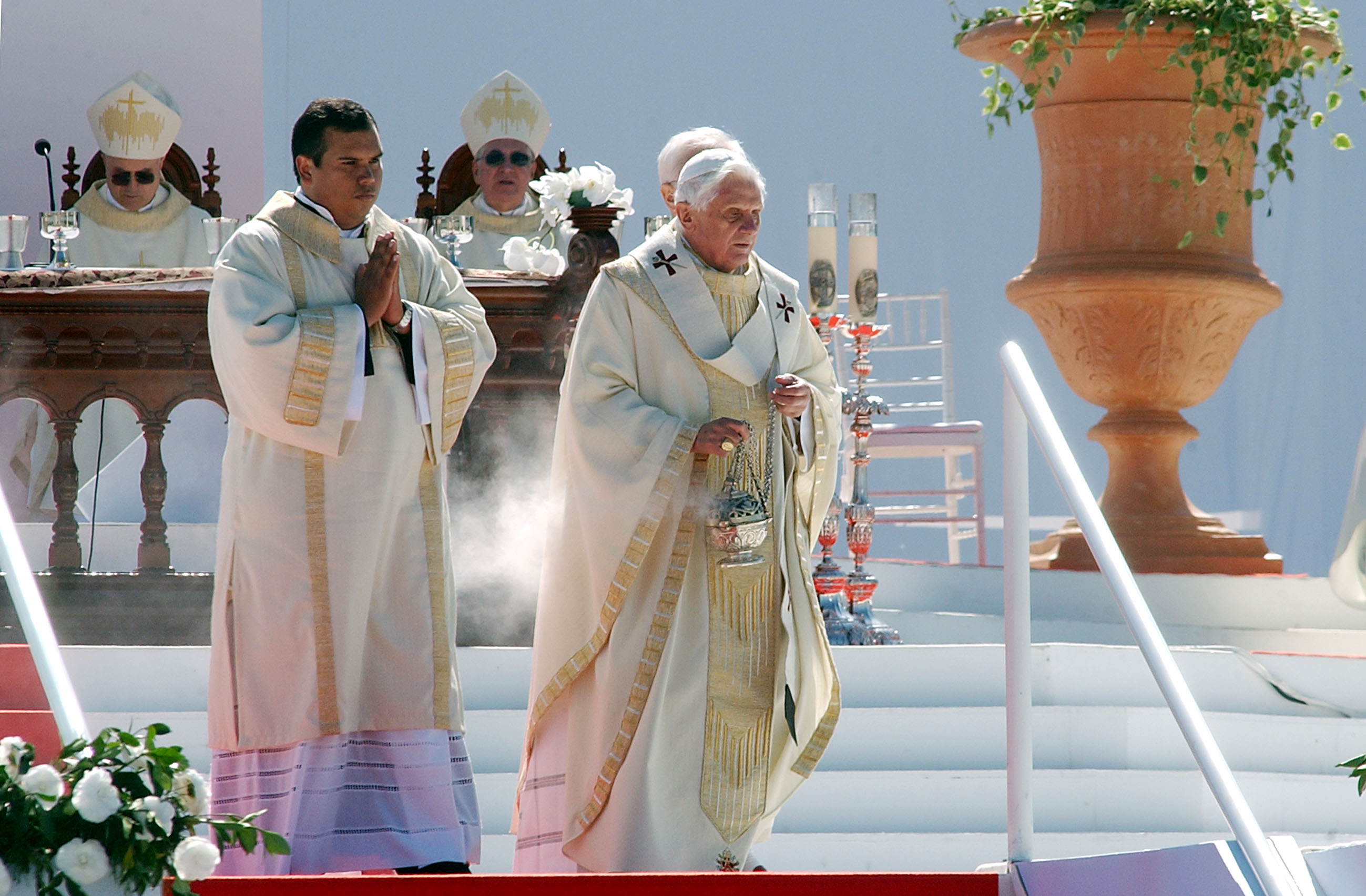 Cerimônia de canonização do frade brasileiro Frei Galvão celebrada pelo papa Bento XVI no Campo de Marte em São Paulo, Brasil.